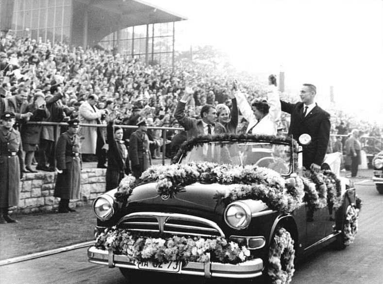 Zentralbild Me 19.10.63 Begeisterung im Walter-Ulbricht-Stadion . Valja und Juri beim Fußballspiel DDR-Ungarn. Große Begeisterung herrschte am 19. Oktober 1963 im Berliner Walter-Ulbricht-Stadion, wo 70 000 Zuschauer die beiden sowjetischen Himmelsstürmer Valentina Tereschkowa und Juri Gagarin herzlich als Ehrengäste des Fußball-Länderspiels DDR- Ungarn begrüssten. An der Seite ders Ersten Sekretärs der ZK der SED und Vorsitzenden des Staatsrates, Walter Ulbricht, nahmen die beiden Kosmonauten auf der Ehrentribüne Platz. Besonderen Applaus "verdiente" sich Valentina, als die den Ehrenanstoss dieser bedeutsamen Europapokal -Begegnung vollzog.UBz: Unter dem Jubel der Zuschauer fuhren die beiden Kosmonauten eine Ehrenrunde. Hier begrüße Valentina Terschkowa, gemeinsam mit den DDR-Sportlern Hirsch, Ingrid Krämer (2.v.l.) und Dieter Pophal (ganz links) die sportbegeisterten Berliner. (Sturm)